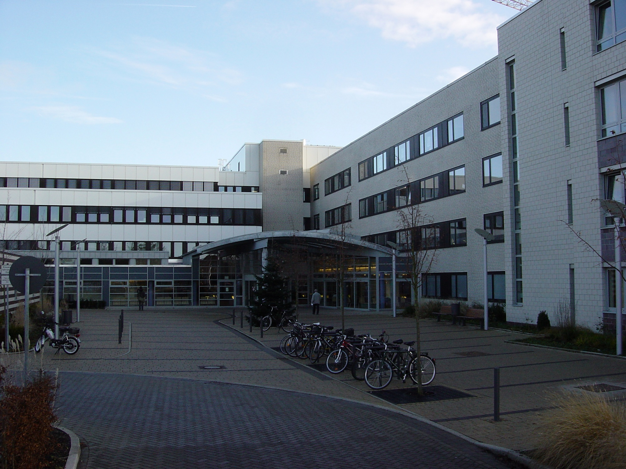 Städtisches Klinikum Wolfenbüttel, Alter Weg 80, 38302 Wolfenbüttel